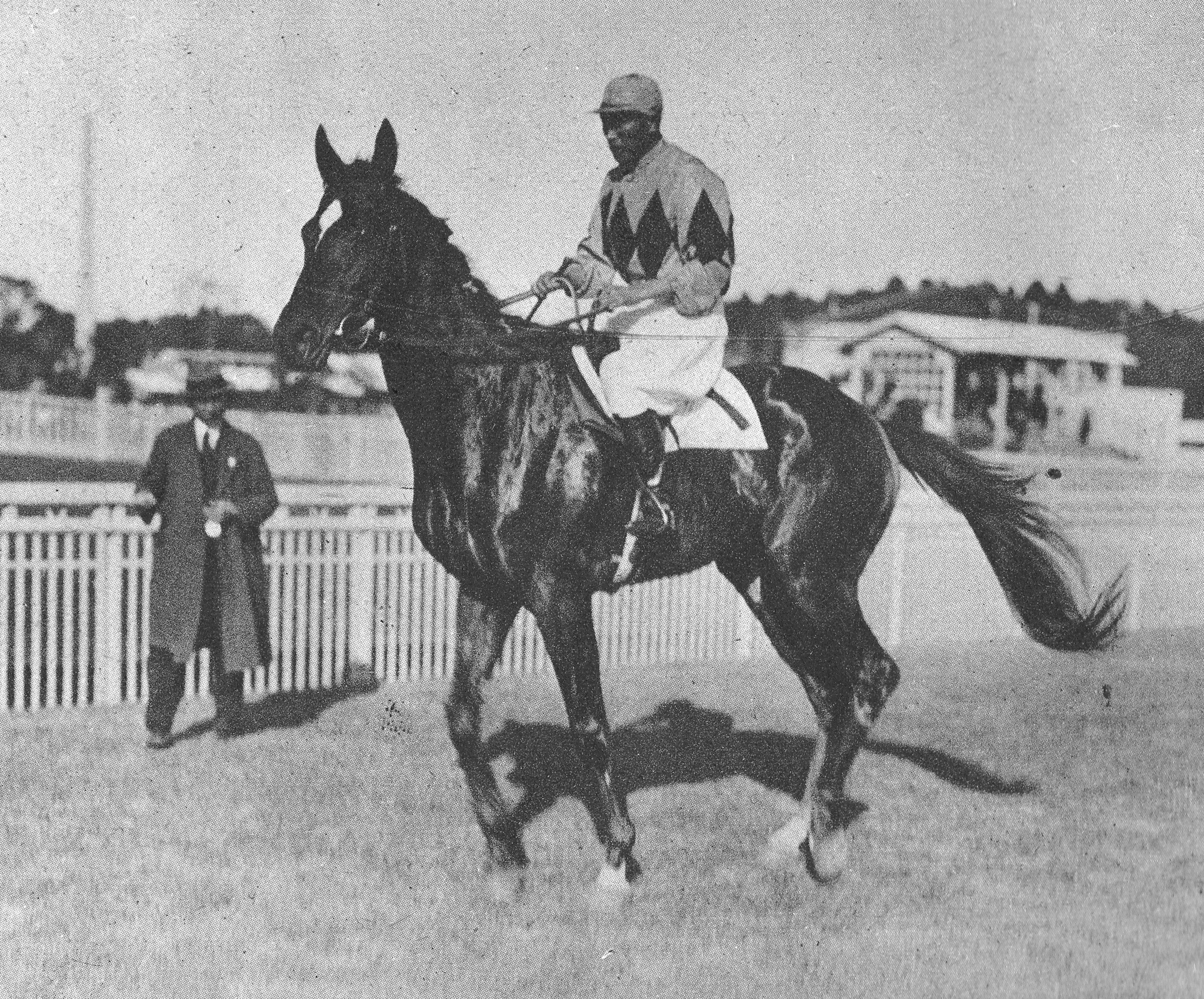 目黒記念勝利時のカブトヤマ